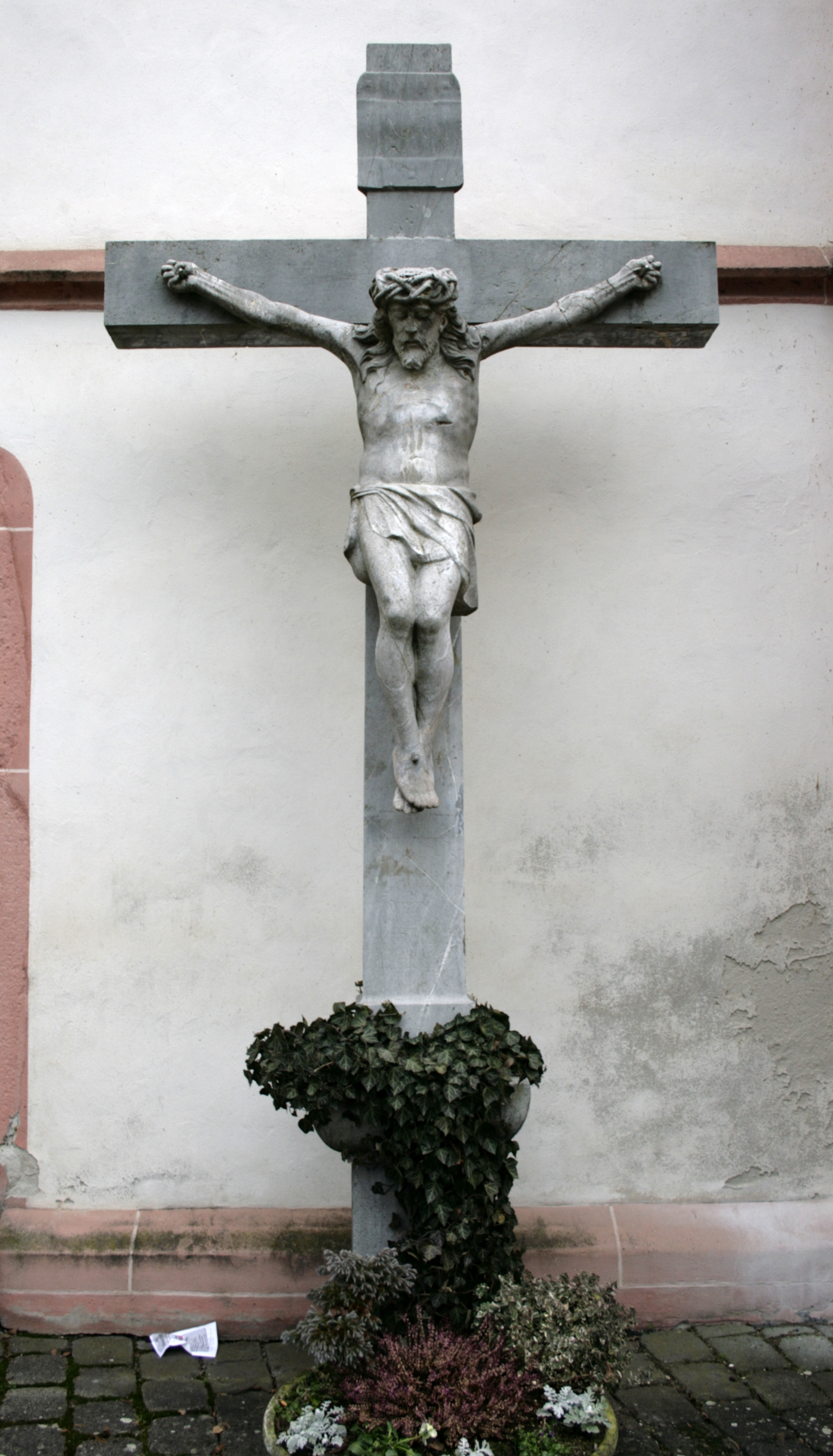 Kruzifix an der Liebfrauenkirche in Hadamar, Deutschland